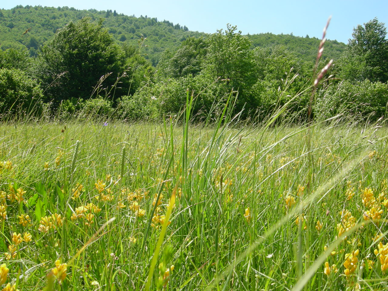 miris trava